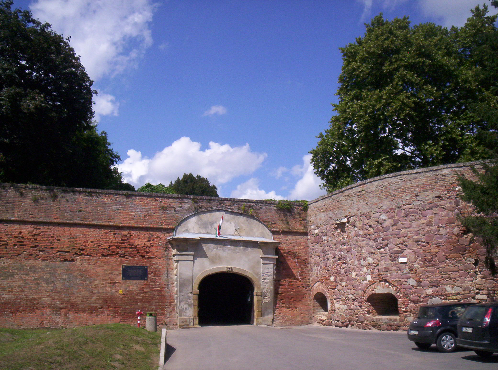 A Szigetvári vár bejárata. Az emléktábla Vörösmarty Mihály 1821 őszén történt látogatására emlékeztet. – photo taken by uploader User:Csanády in 2006.